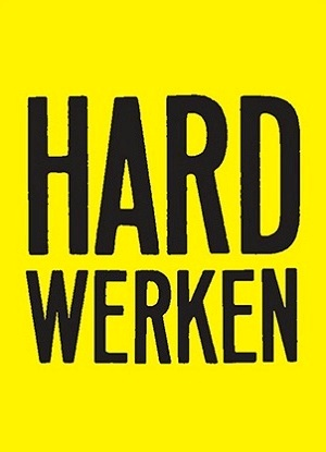 beeldmerk van Hard Werken